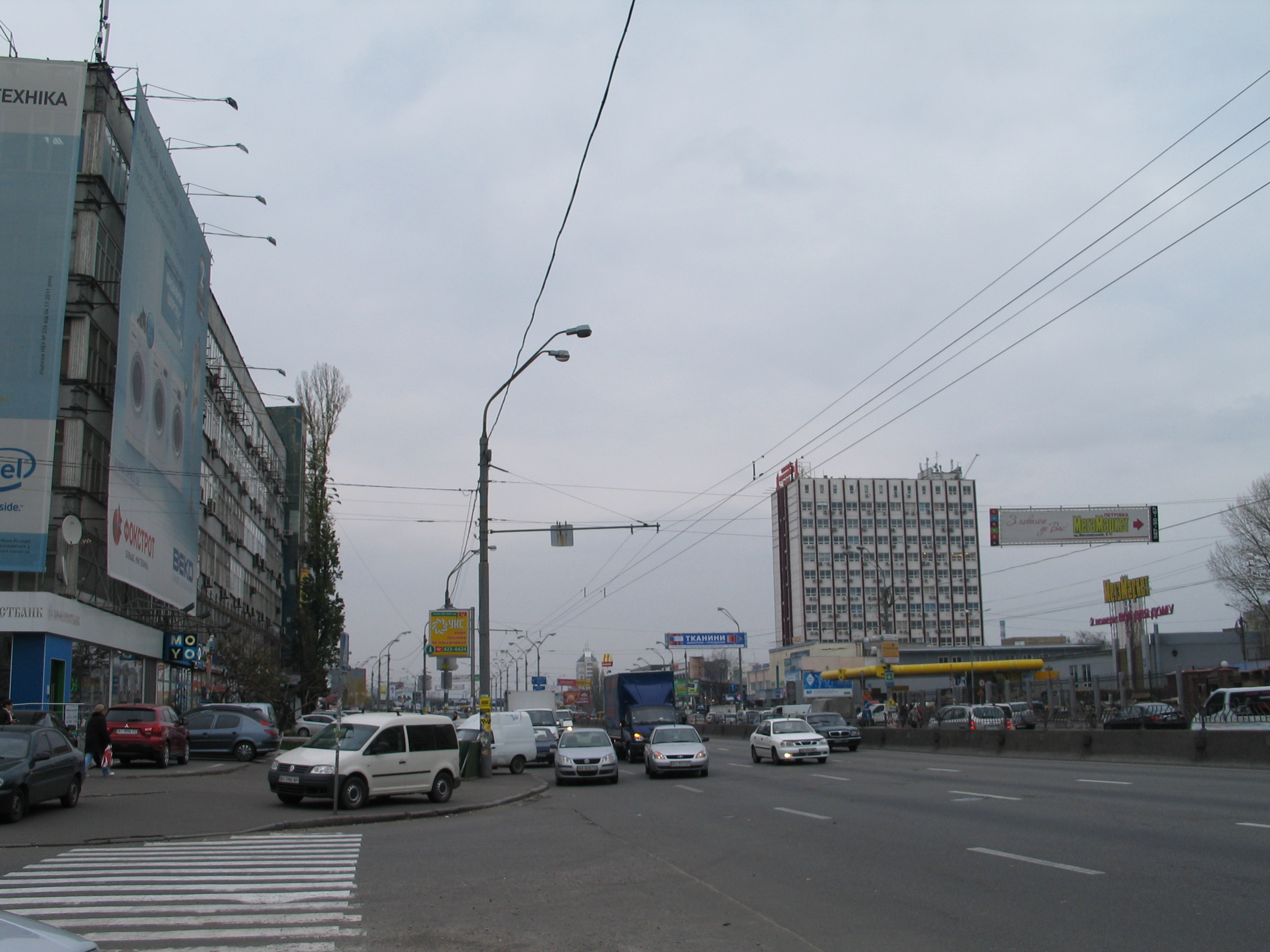 Киев, Московский проспект